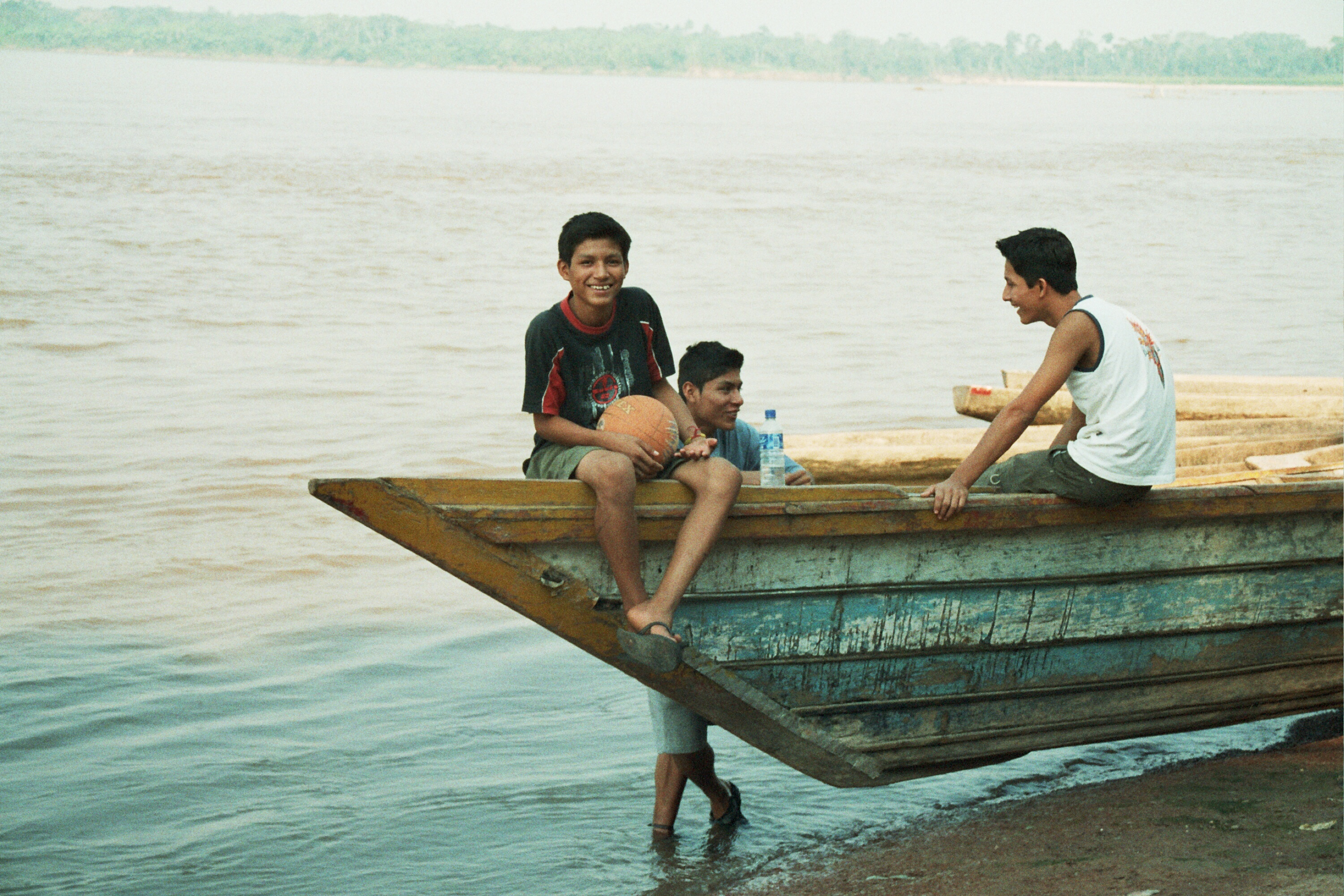 Jugendliche in Yurimaguas (Peru) am Amazonaszufluß Huallanga